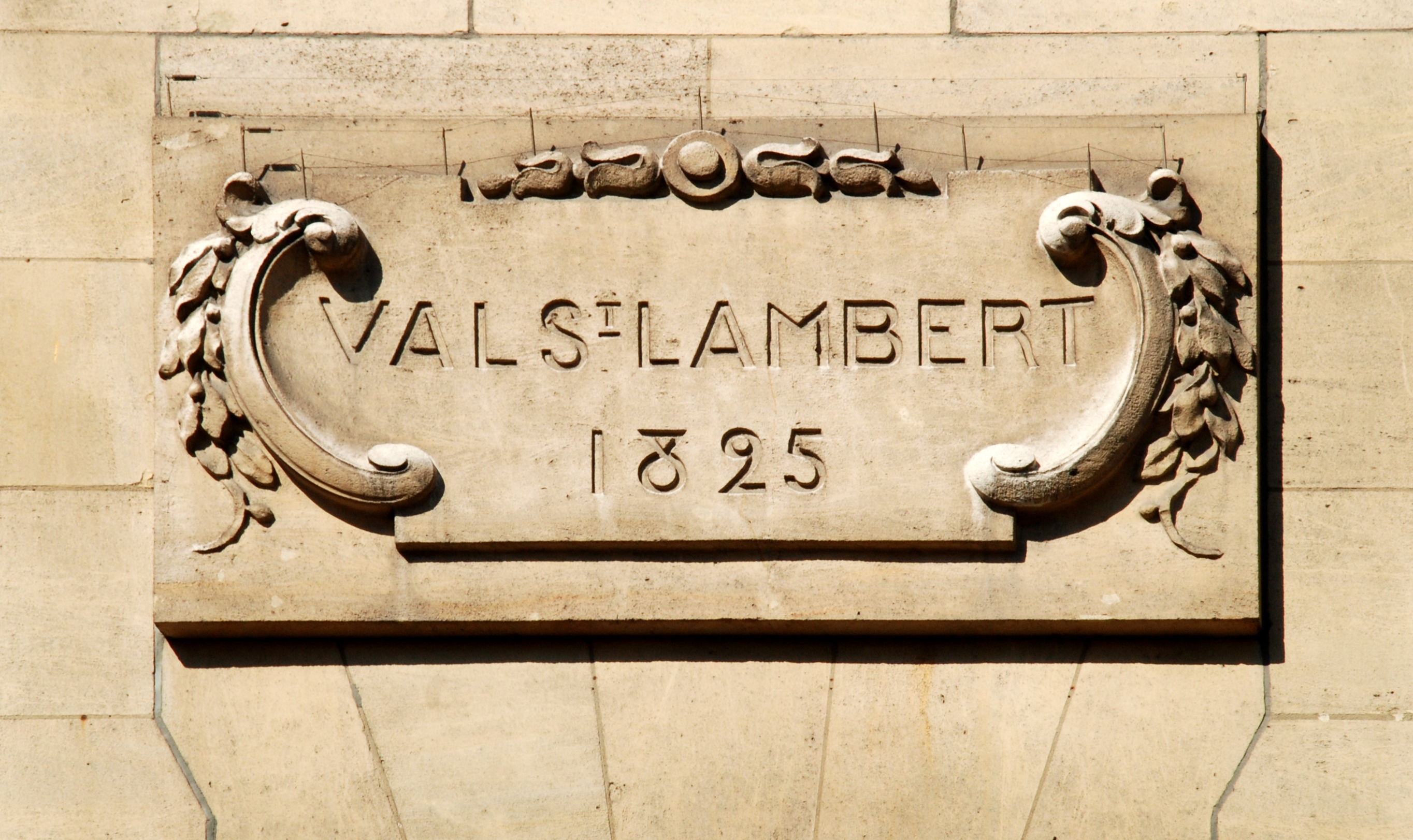 Belgique - Bruxelles - Ancien siège des cristalleries du Val-Saint-Lambert